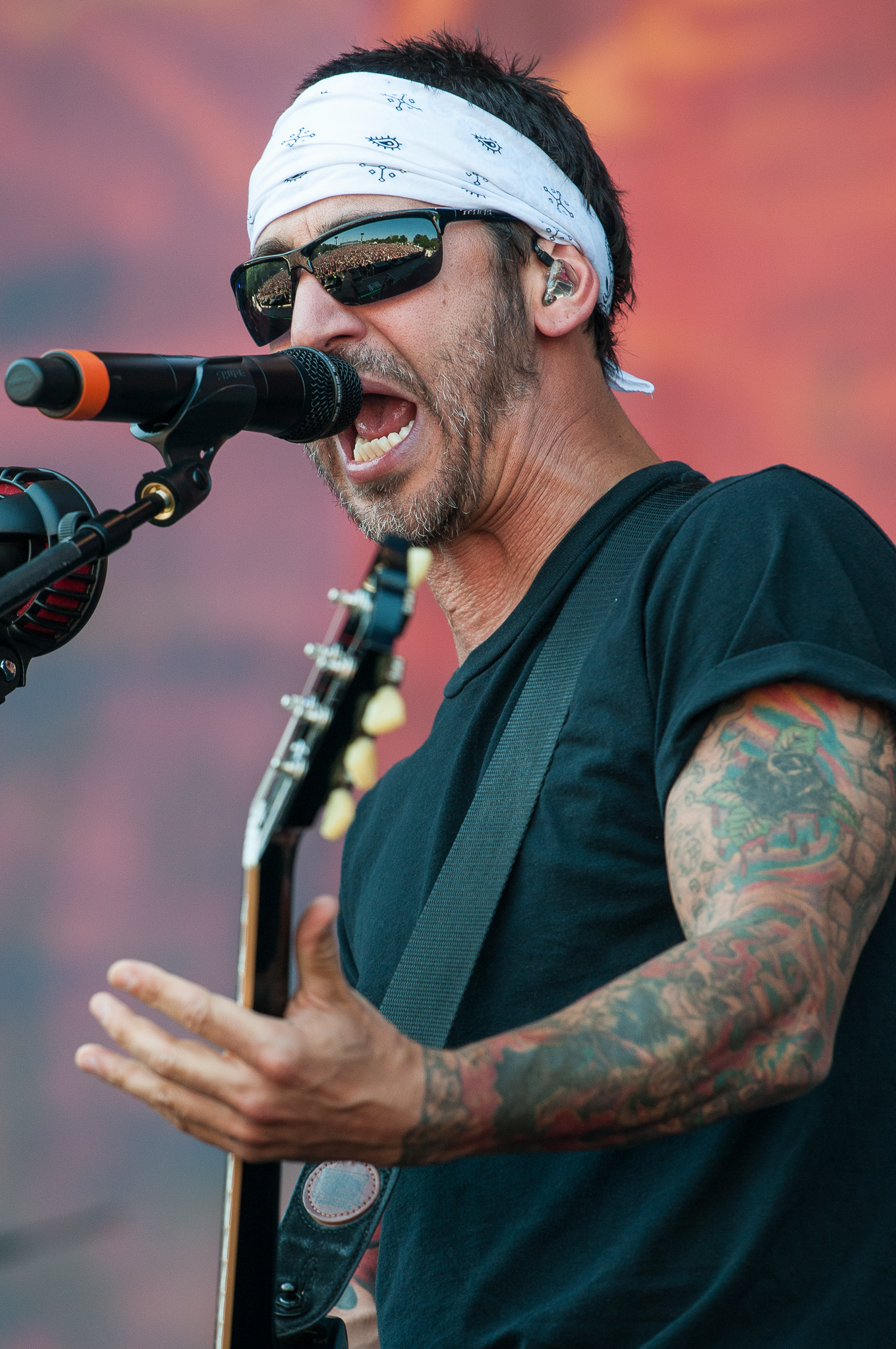 ARGO-Konzerte,Beck's Park Stage,Festival,Godsmack,Konzert,Livekonzert,Livemusik,Musik,RiP,Rock im Park 2015,Salvatore Paul Erna,Sully Erna